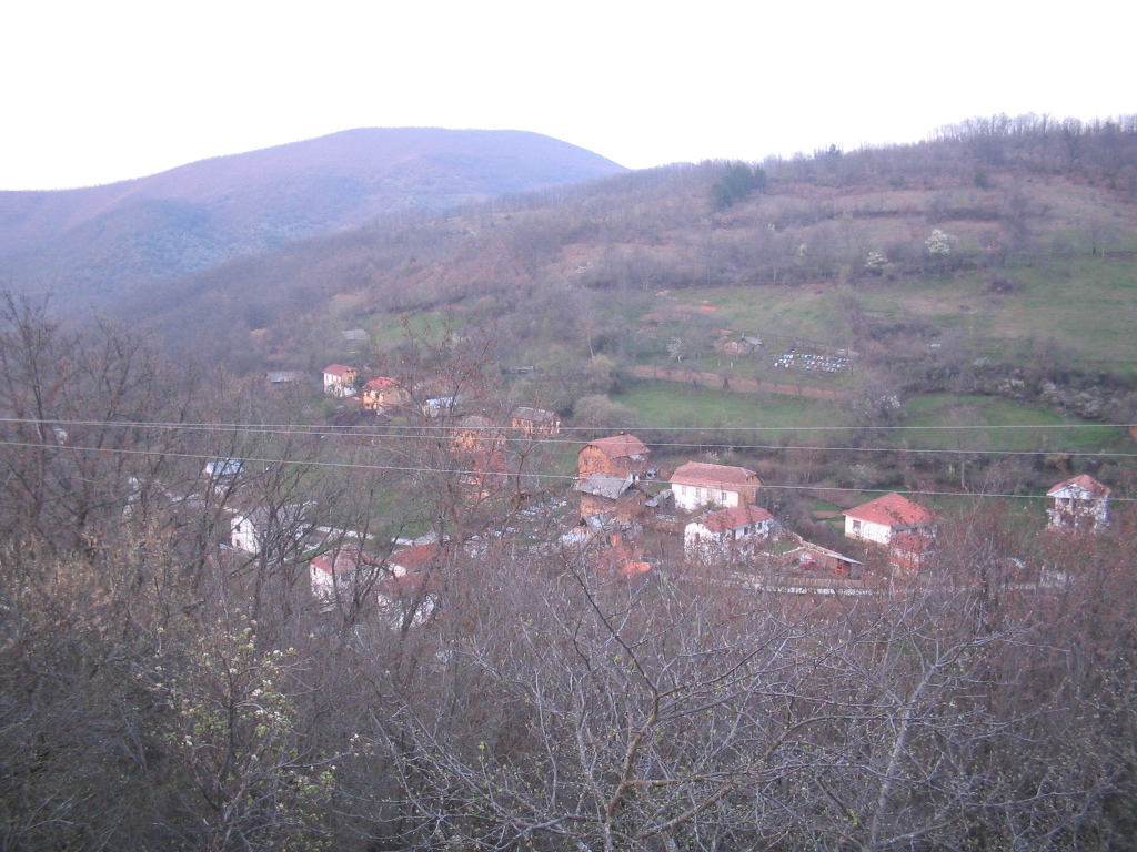 Махалата Райовци на село Сланско, Република Македония.